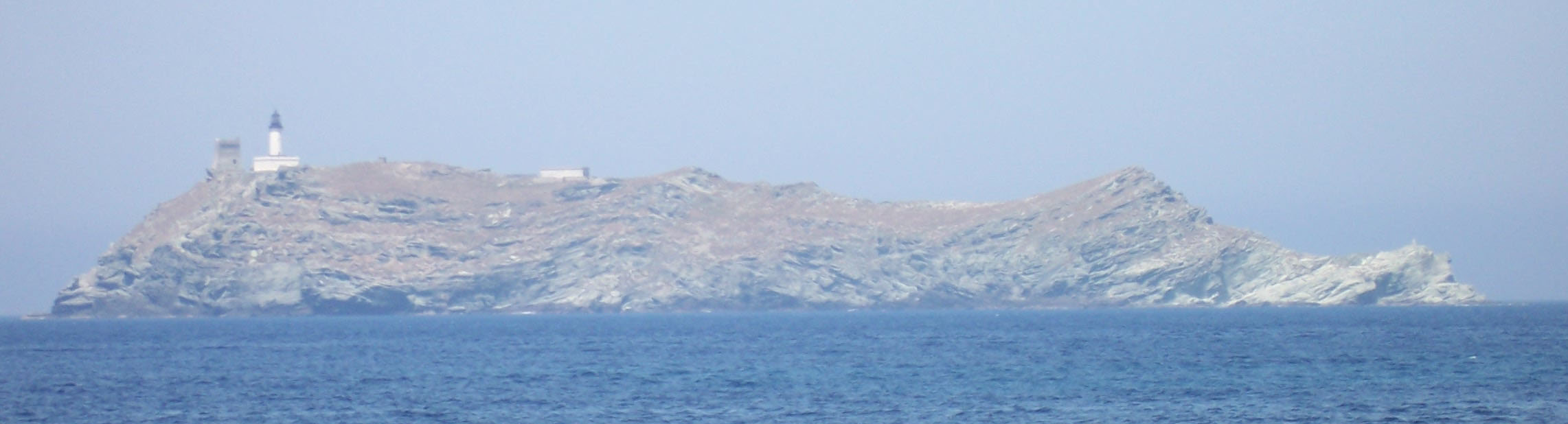 Giraglia Island (Corsica)